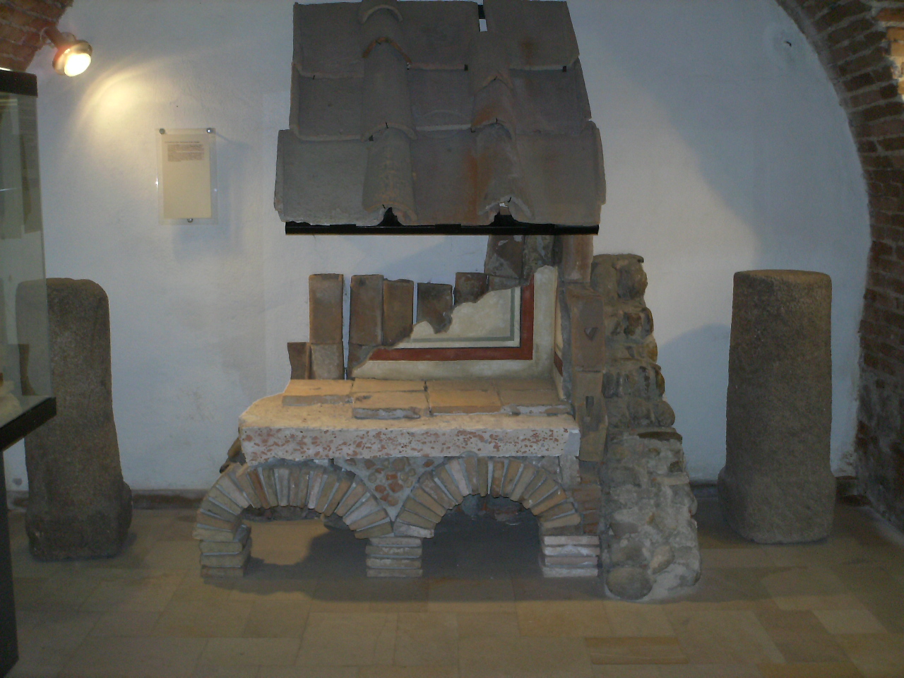 Modell Aufbau eines römischen Heizungssystems im Römermuseum Enns (Hypokausten, Tubuli)